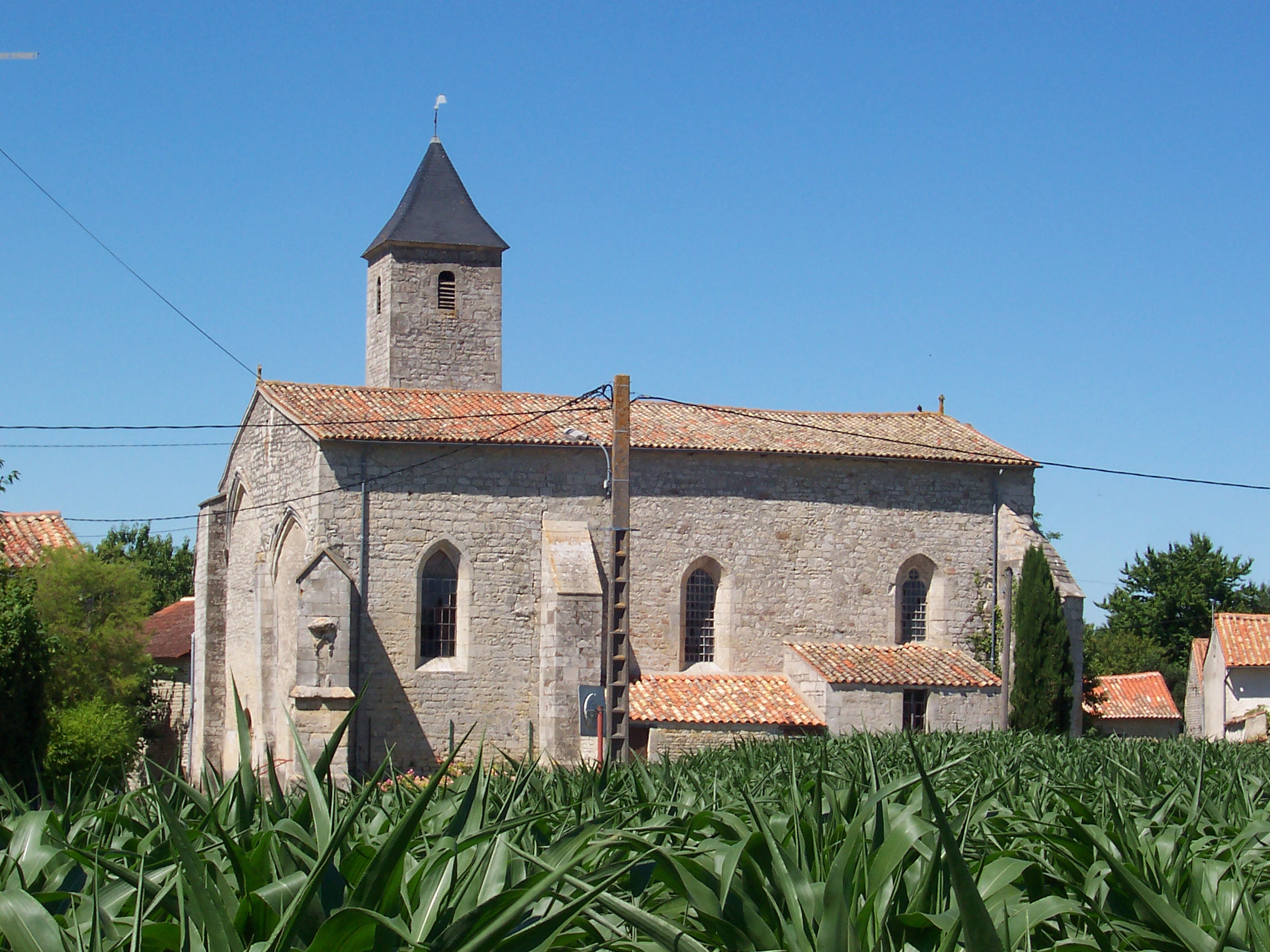 Eglise de St Martin d'Entraigues (orientation sud)